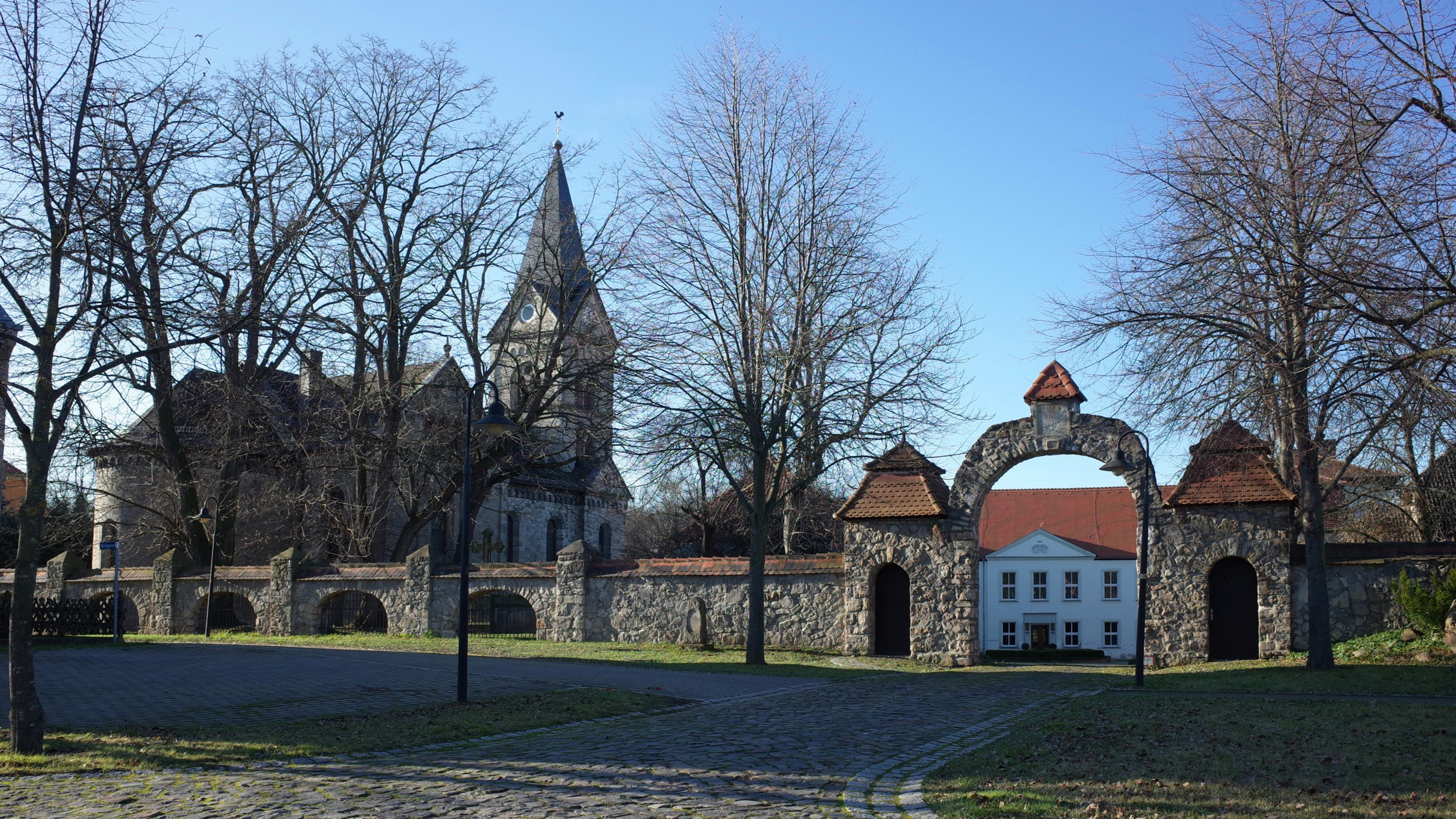 Staßfurt, Ortsteil Rathmannsdorf. Der Friedensplatz mit Ansicht auf die evangelische St.-Pauli-Kirche und das Schlossportal mit Schloss (Gutshaus).